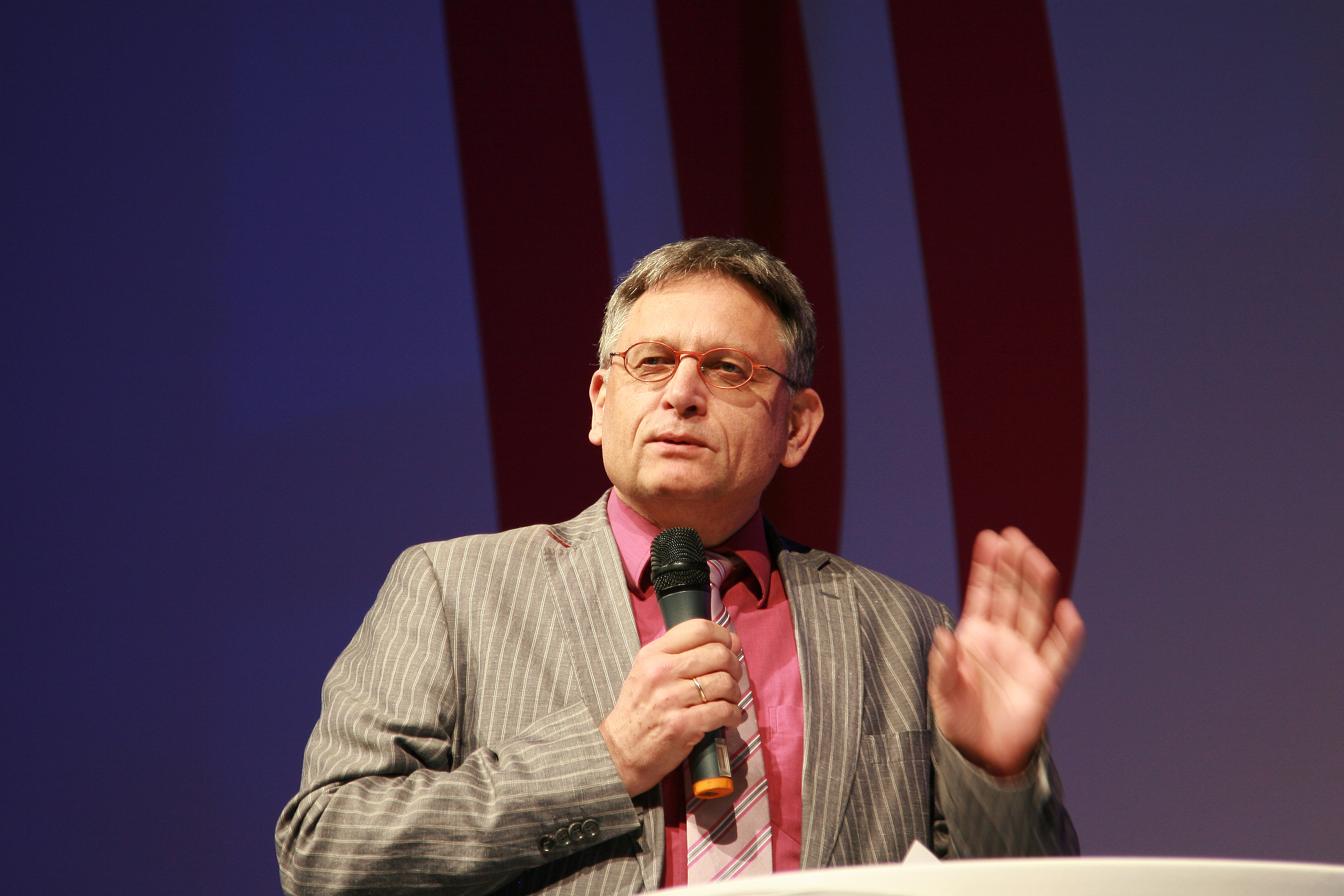 Helmut Matthies, Leiter der Evangelischen Nachrichtenagentur idea und Chefredakteur von "ideaSpektrum", beim Christlichen Führungskräftekongress im Februar 2011 in Nürnberg